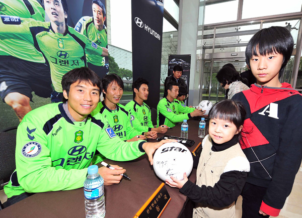 '전북현대모터스 축구단 팬 사인회' 개최